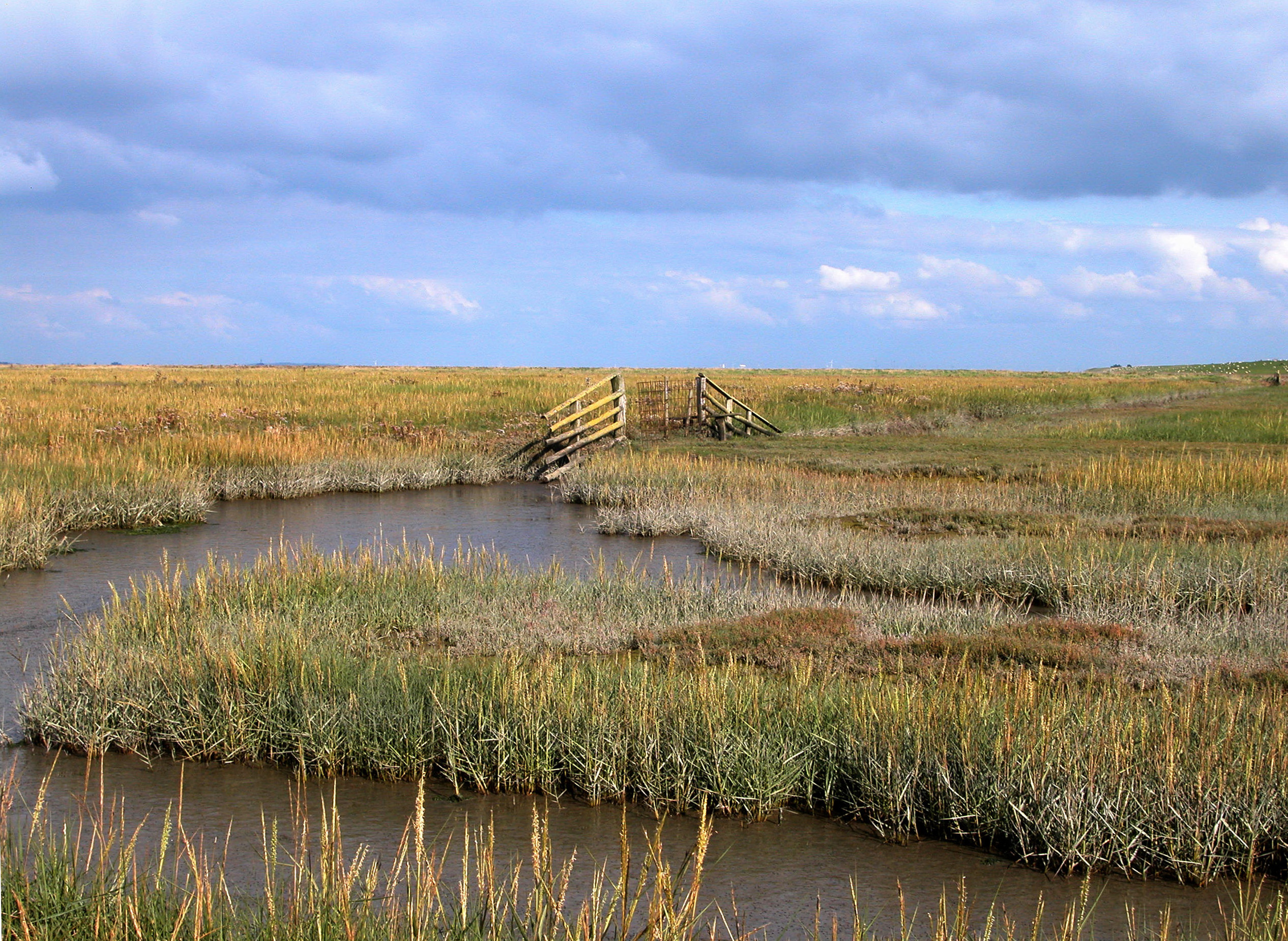 Die Bereiche der Salzwiesen stehen unter Naturschutz